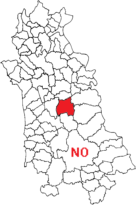 Mappa con posizione del comune nella provincia italiana di Novara